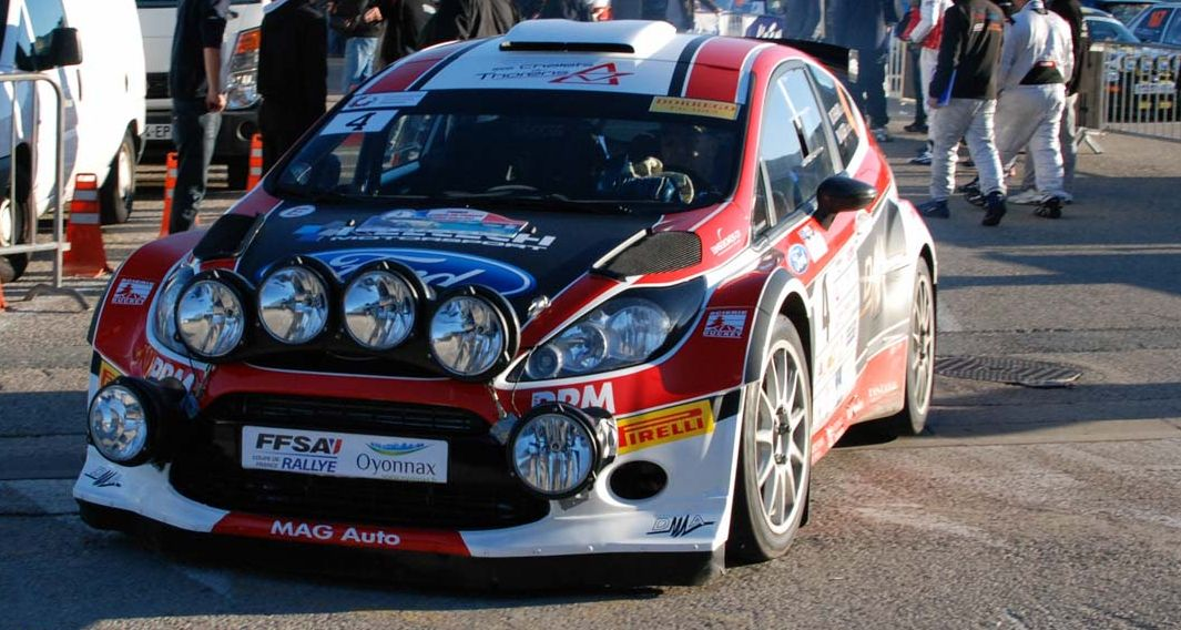 Gherardi-Augier lors de leurs victoire en coupe de france des rallyes 2013